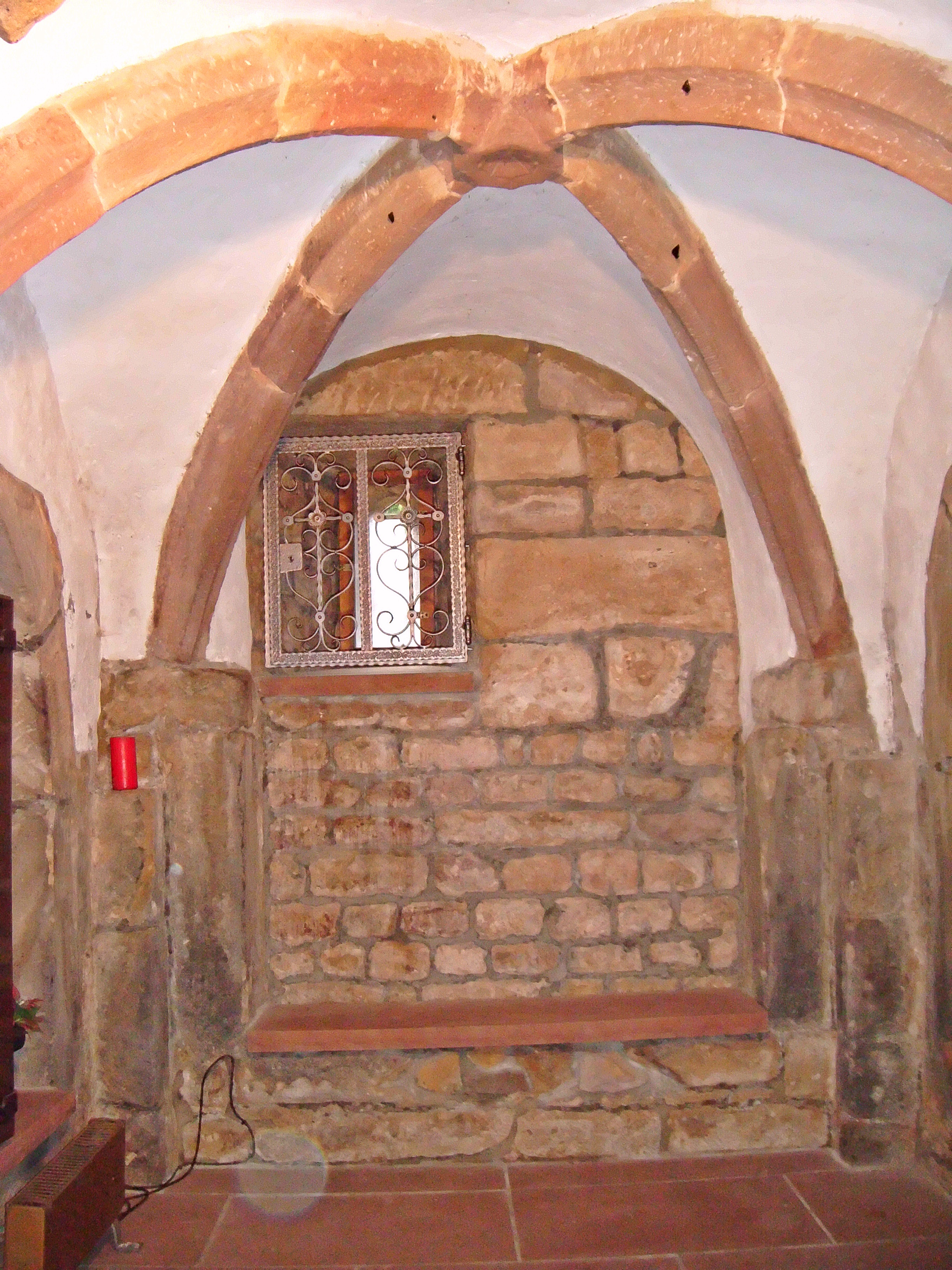 Prot. Martinskirche Battenberg, Innenaufnahme der Gruftkapelle unter dem Turm